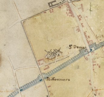 Butte des Cinq Moulins, sur le plan de circonvallation de Paris, 1789. Gallica Bibliothèque Nationale de France.